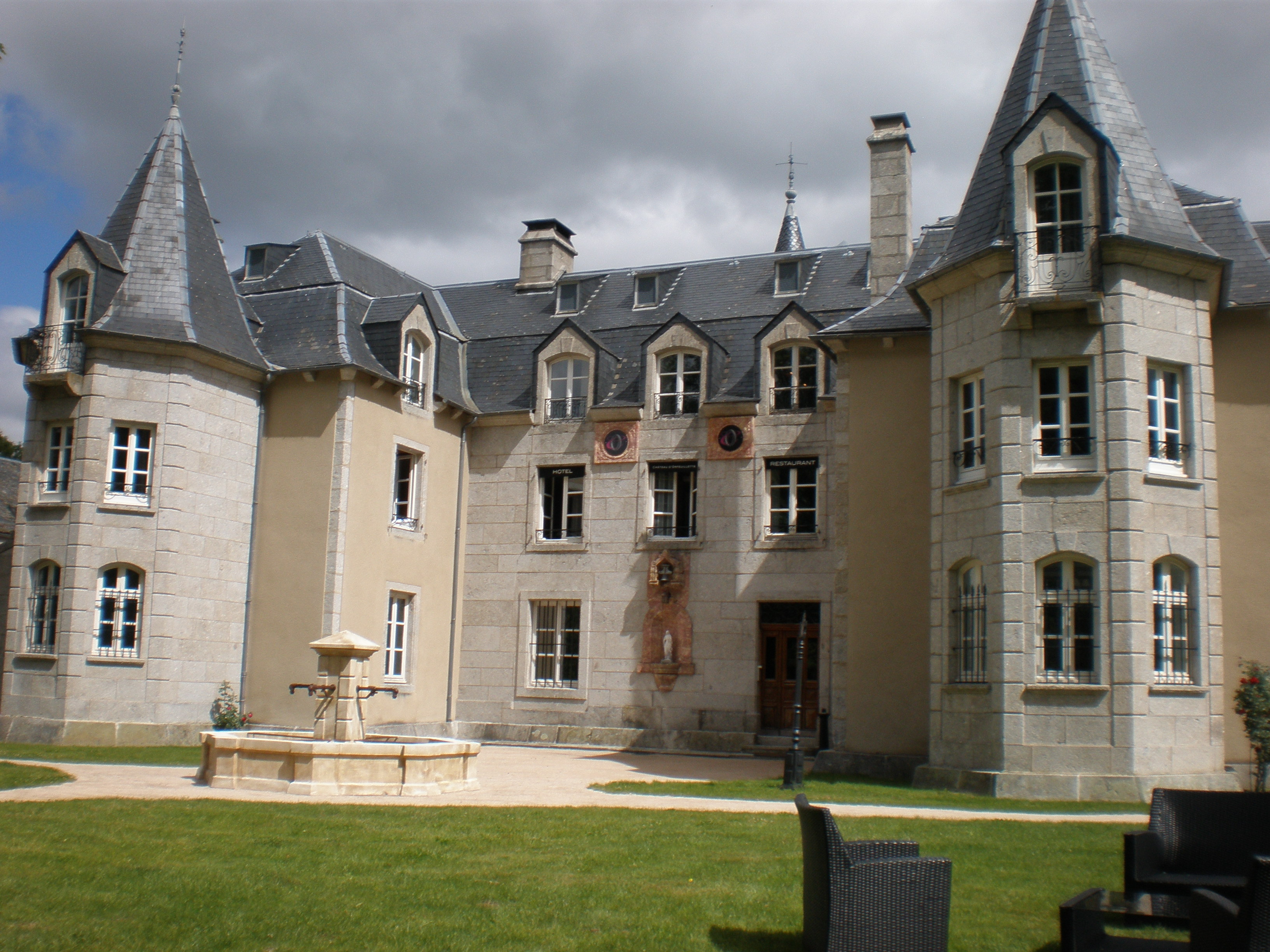 Le château d'Orfeuillette sur la commune d'Albaret-Sainte-Marie (Lozère)